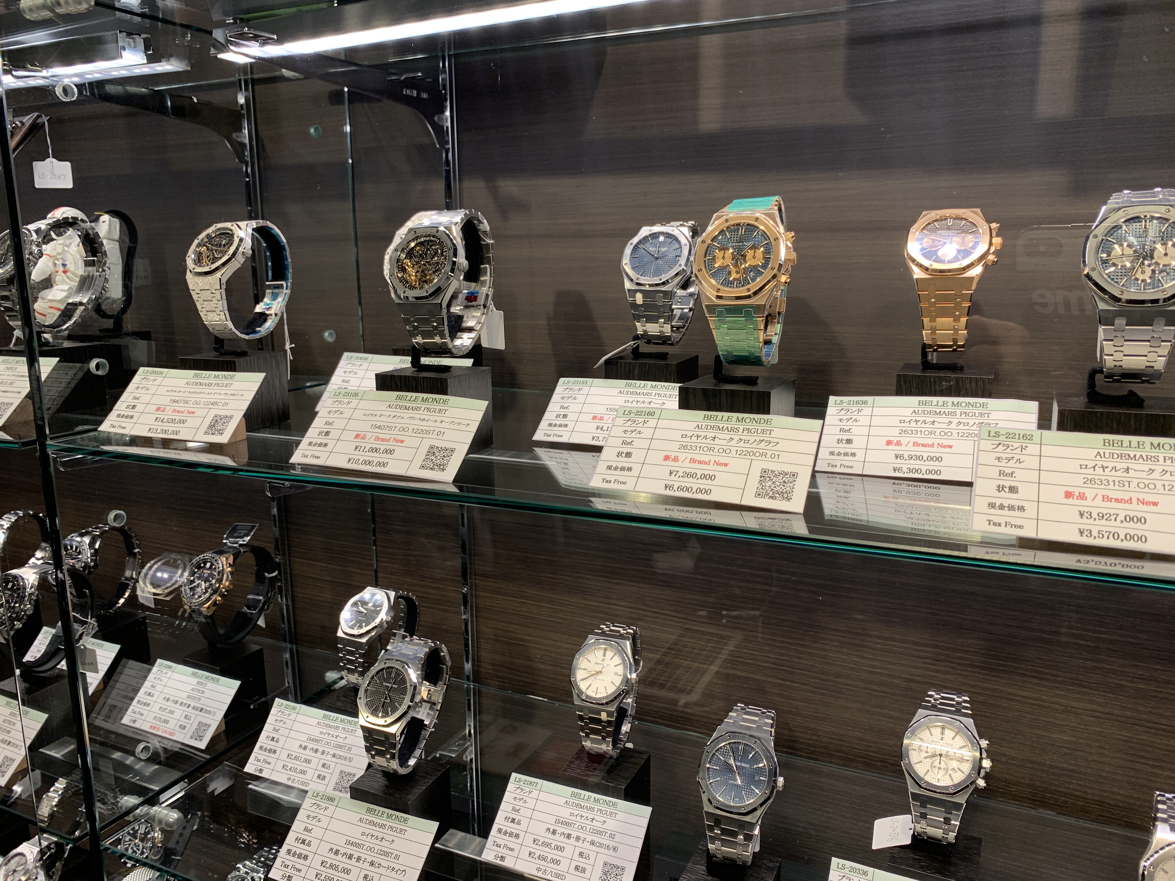 高額な時計が大量に陳列されている